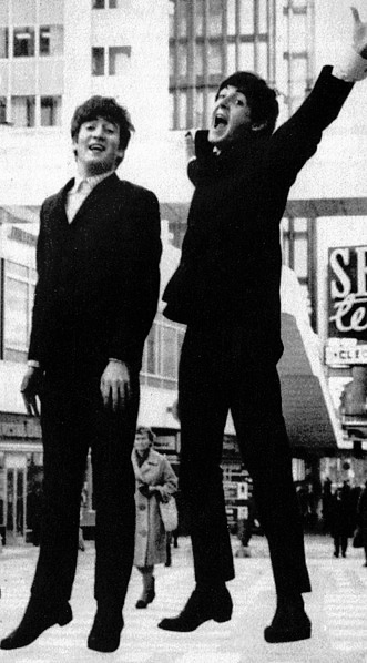 The Beatles i Hötorgscity, Stockholm 1963